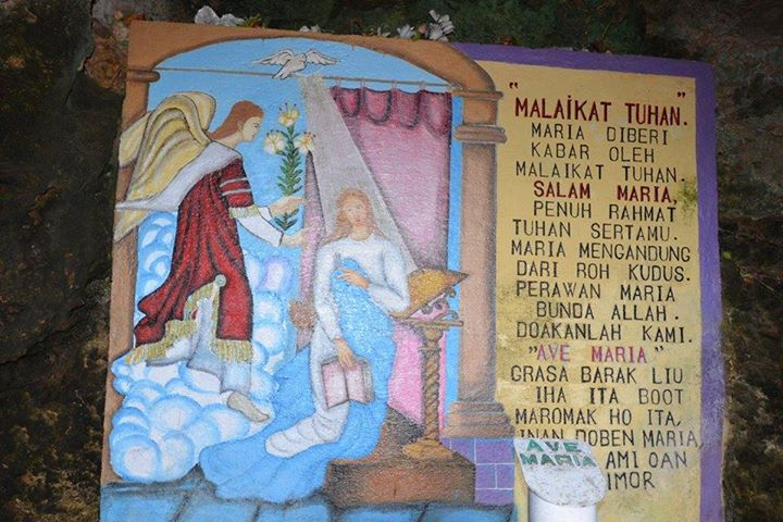 Fatumaca, Gariuai